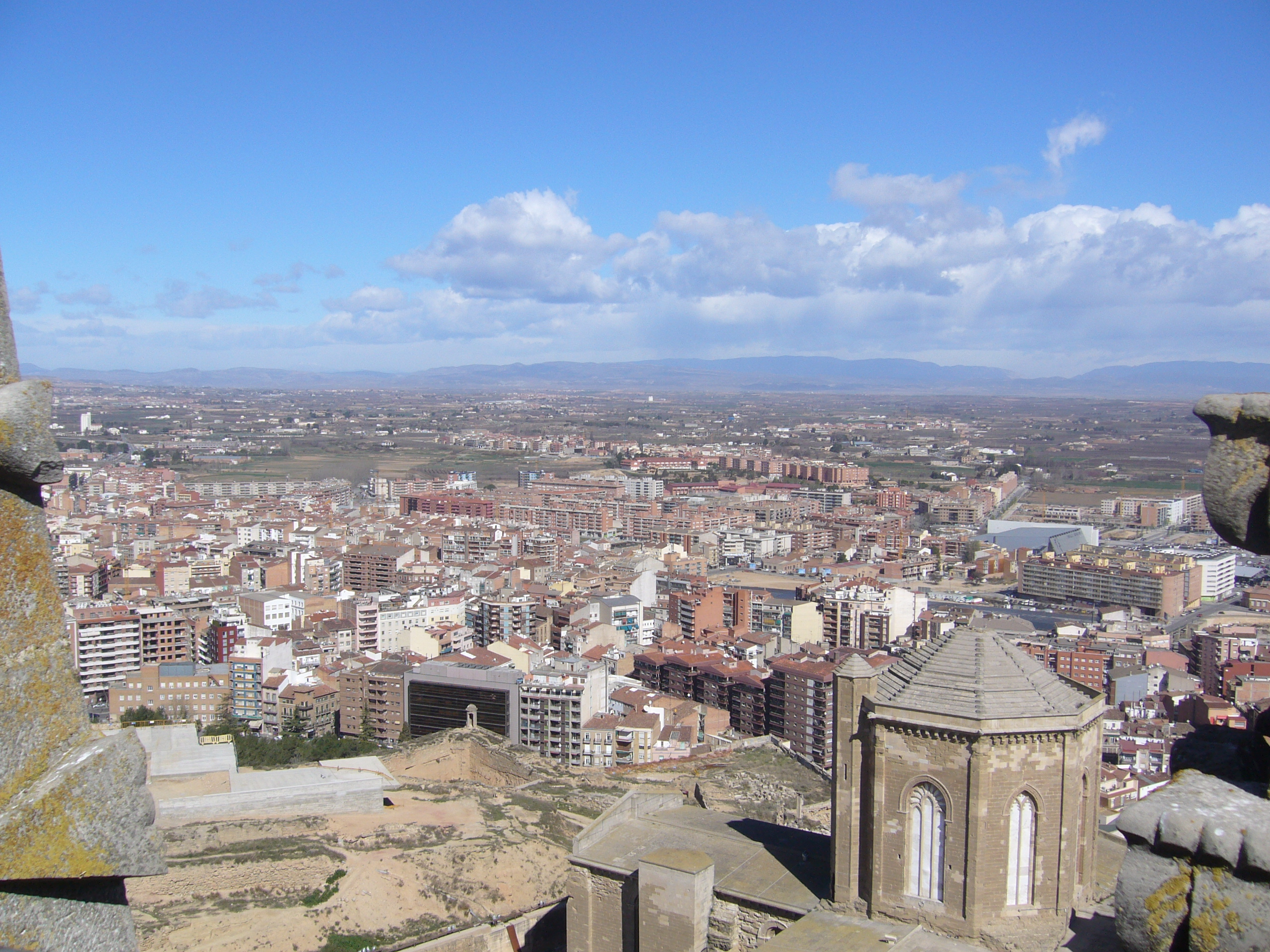 Vistes des de dalt del campanar de la Seu Vella de Lleida en direcció nord